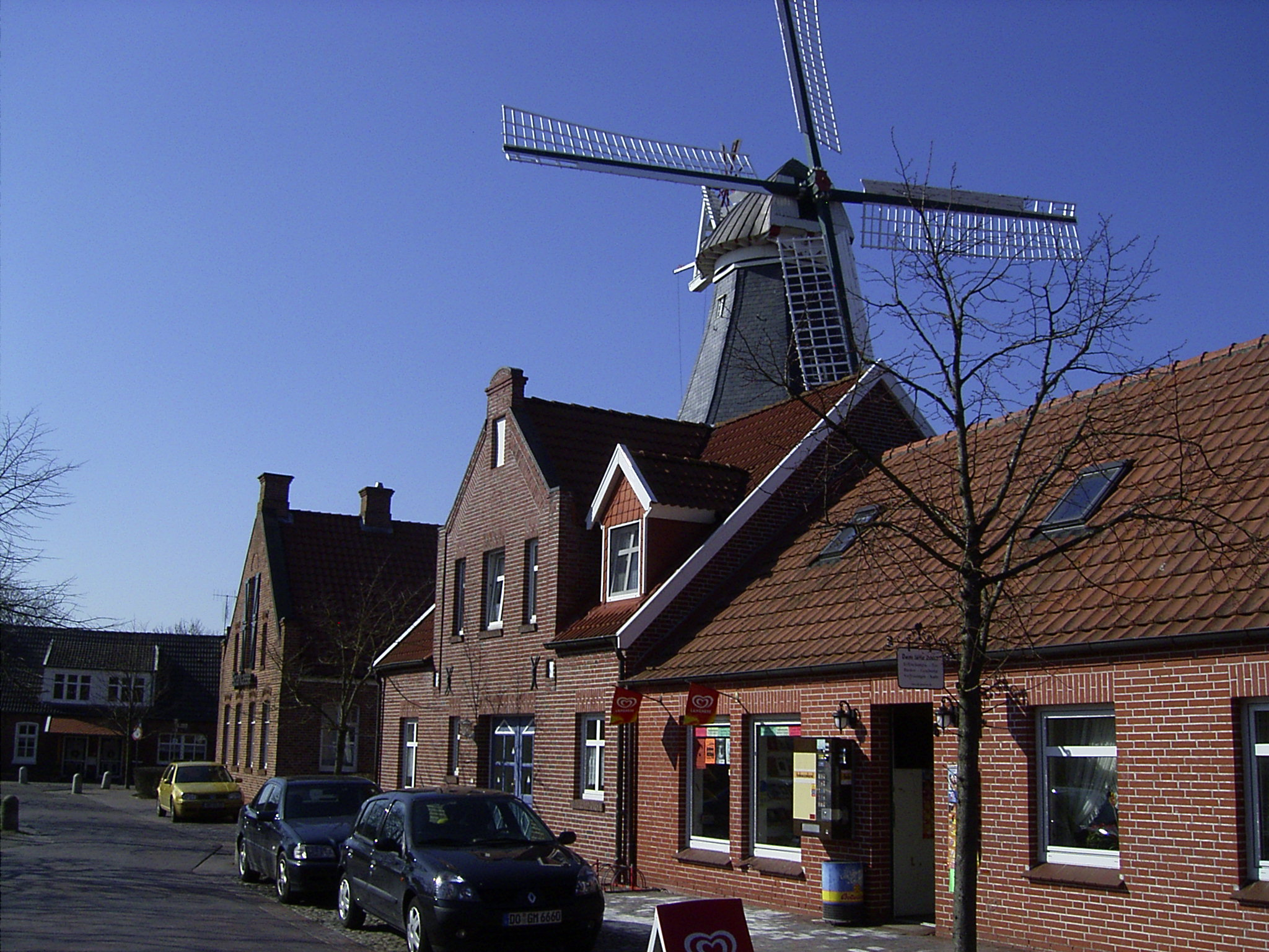 Straße in Ditzum mit Ditzumer Mühle